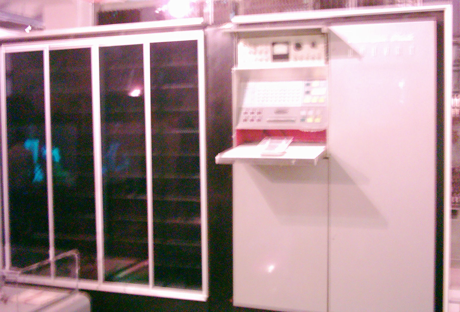 Remington Rand UNIVAC im Technischen Museum Wien. Public Domain